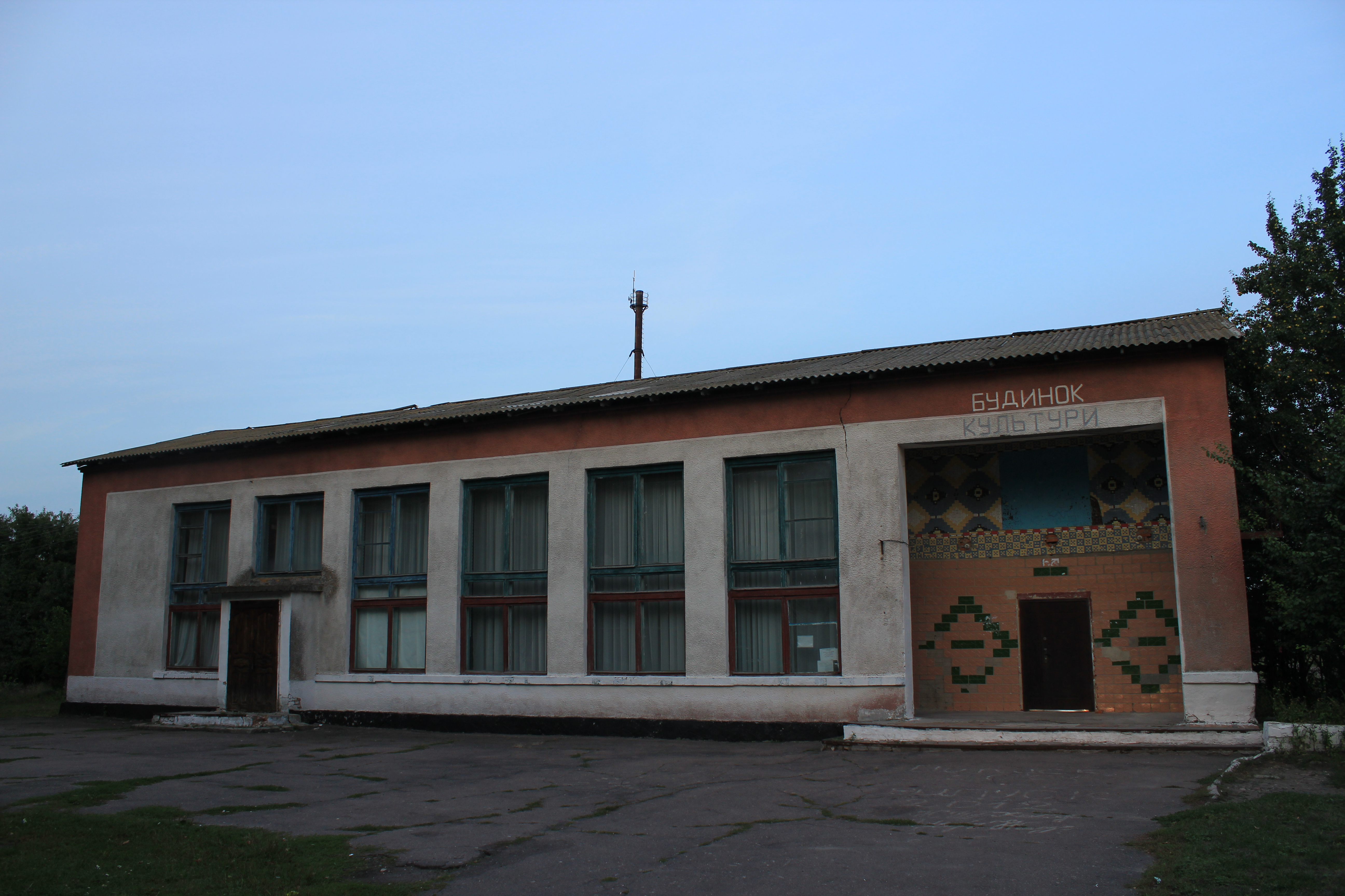 Жоравський будинок культури